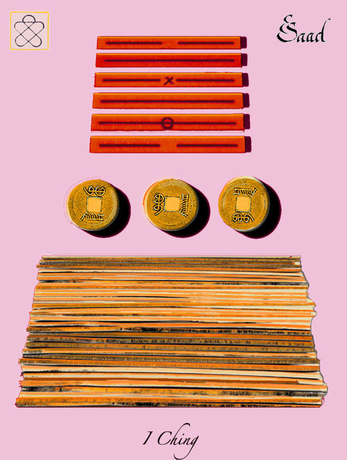 Cómo consultar el I Ching